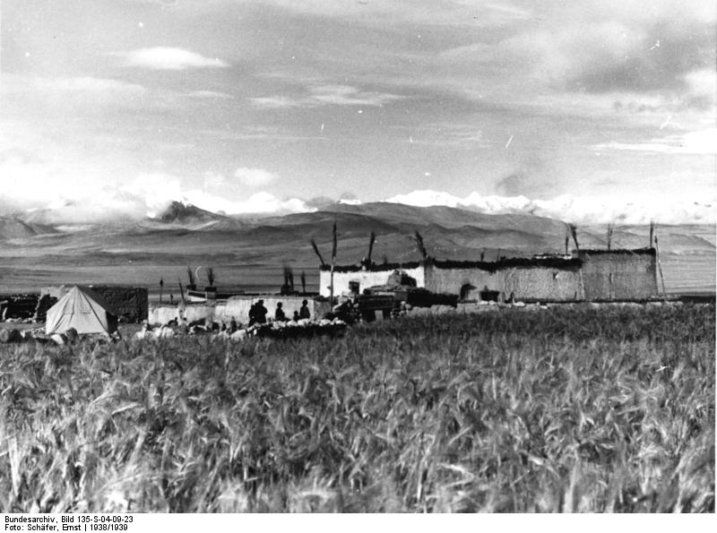 Kampadzong, Gerstenfeld mit Blick auf Everestgruppe